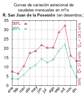 Curvas de variación estacional del río San Juan de la Posesión en su desembocadura. # # Estudio básico para desarrollar plan de riego en Región de Magallanes. Informe final. # Comisión Nacional de Riego # Ministerio de Agricultura # 2017 # url: # urlarchivo: # Tabla 4-7 Resultados de análisis de frecuencia de caudales medios mensuales (m3/s) seleccionados en la Región de Magallanes y Antártica Chilena, pág. 115 mes 50% 85% ene 7.56 3.79 feb 6.42 3.61 mar 10.47 5.91 abr 17.54 9.26 may 18.6 11.08 jun 21.75 14.43 jul 20.28 12.36 ago 20.45 13.98 sep 28.67 18.82 oct 32.24 22.14 nov 16.11 10.55 dic 13.29 4.42 This plot was created with Gnuplot.